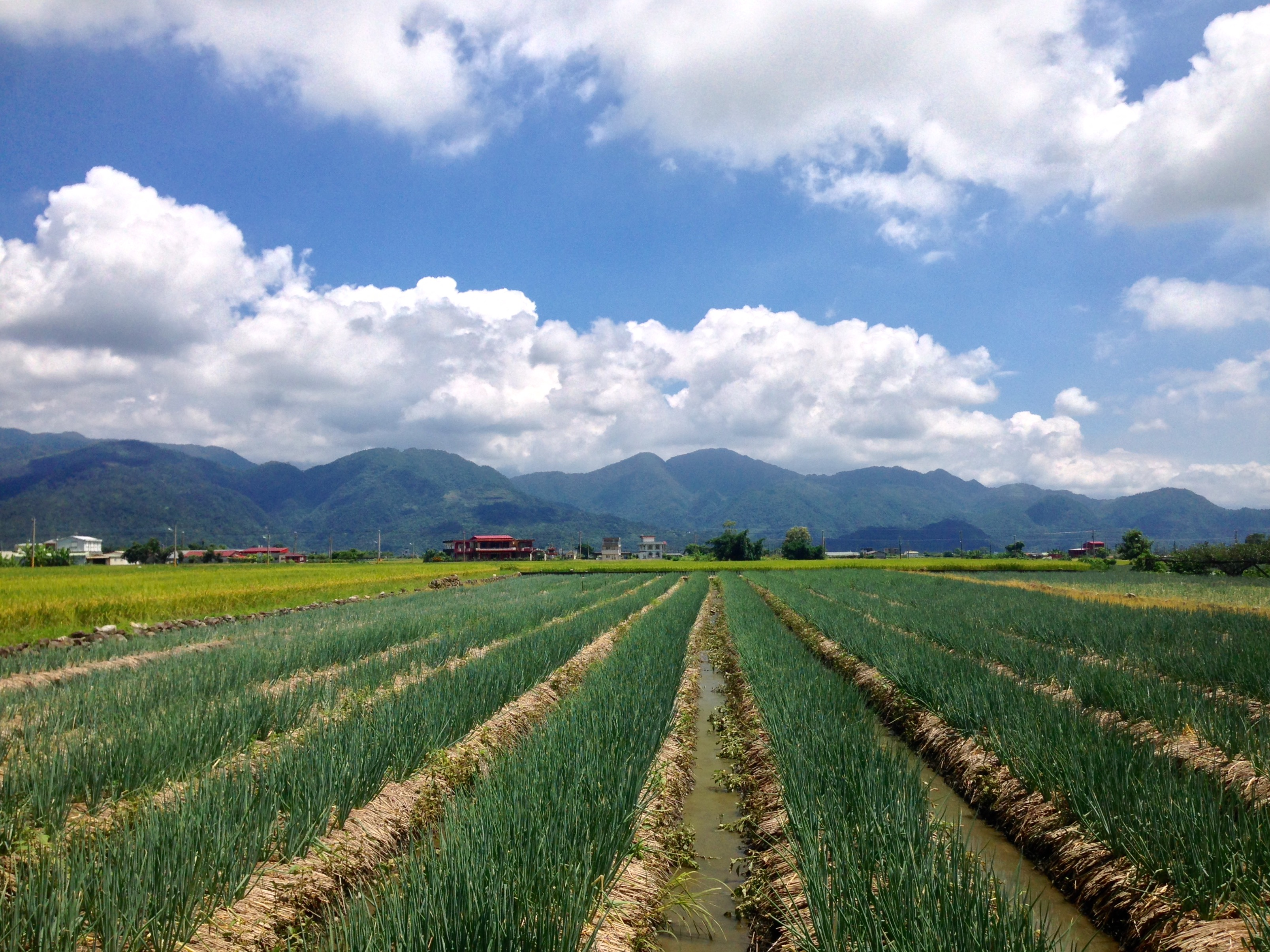 中文（台灣）: 宜蘭縣三星鄉三星蔥田。